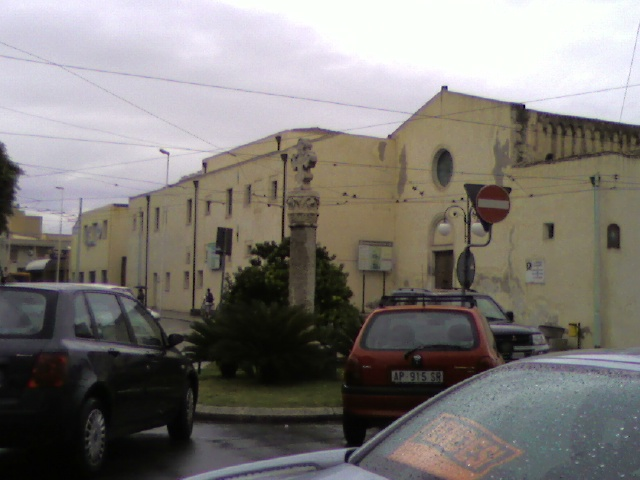 Foto personale scattata, Lunedì 24 settembre 2007 con cellulare Samsung SGH-Z230, raffigurante la croce gotica presente a Quartu Sant'Elena